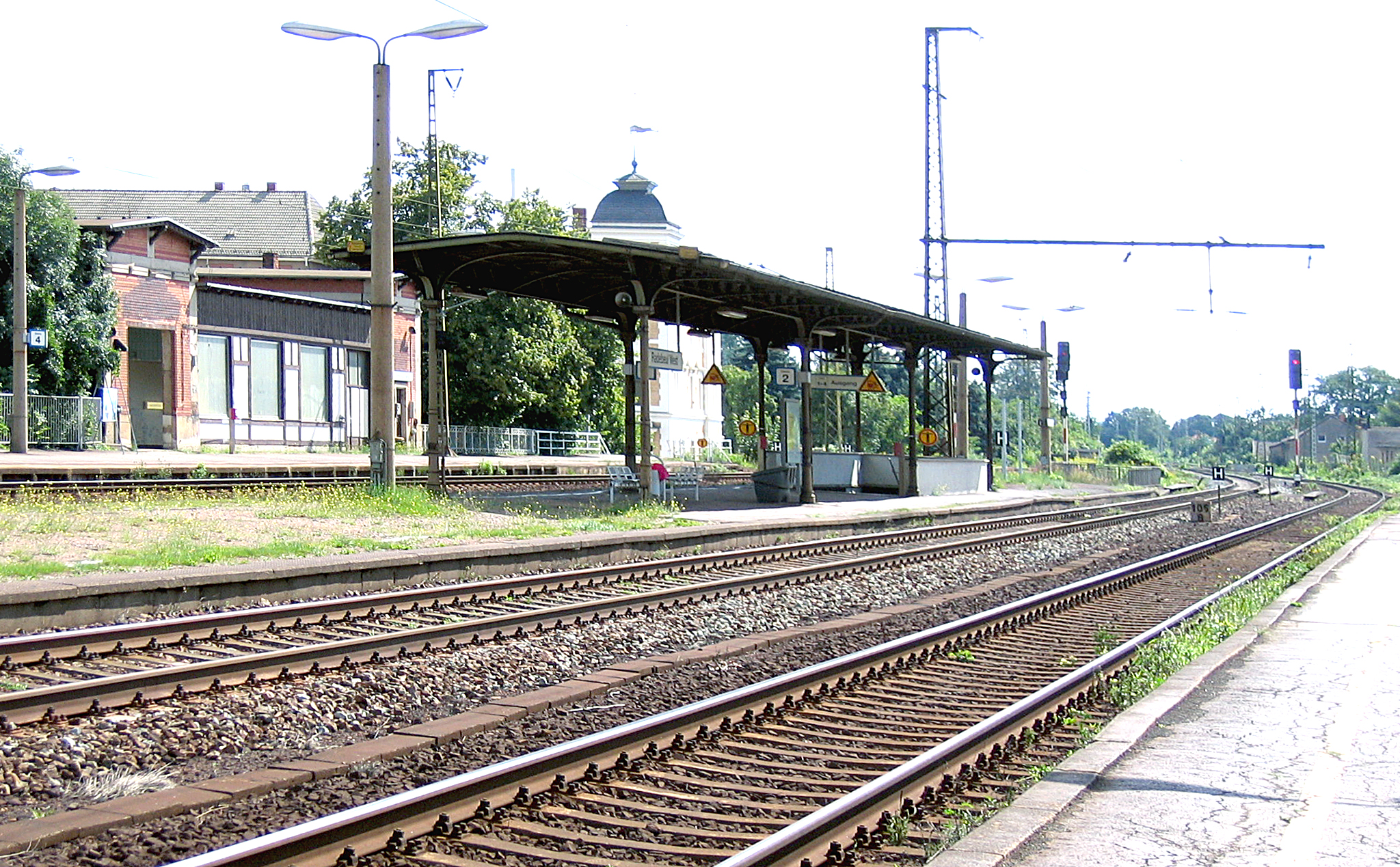 Radebeul, Bahnhof Radebeul West: Überdachung und Wartegebäude, bei den Umbauten 2012/13 abgebrochen